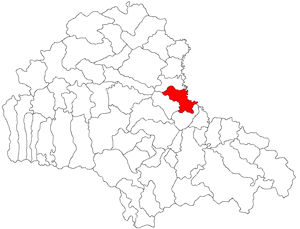 Categorie:Hărţi ale judeţului Braşov